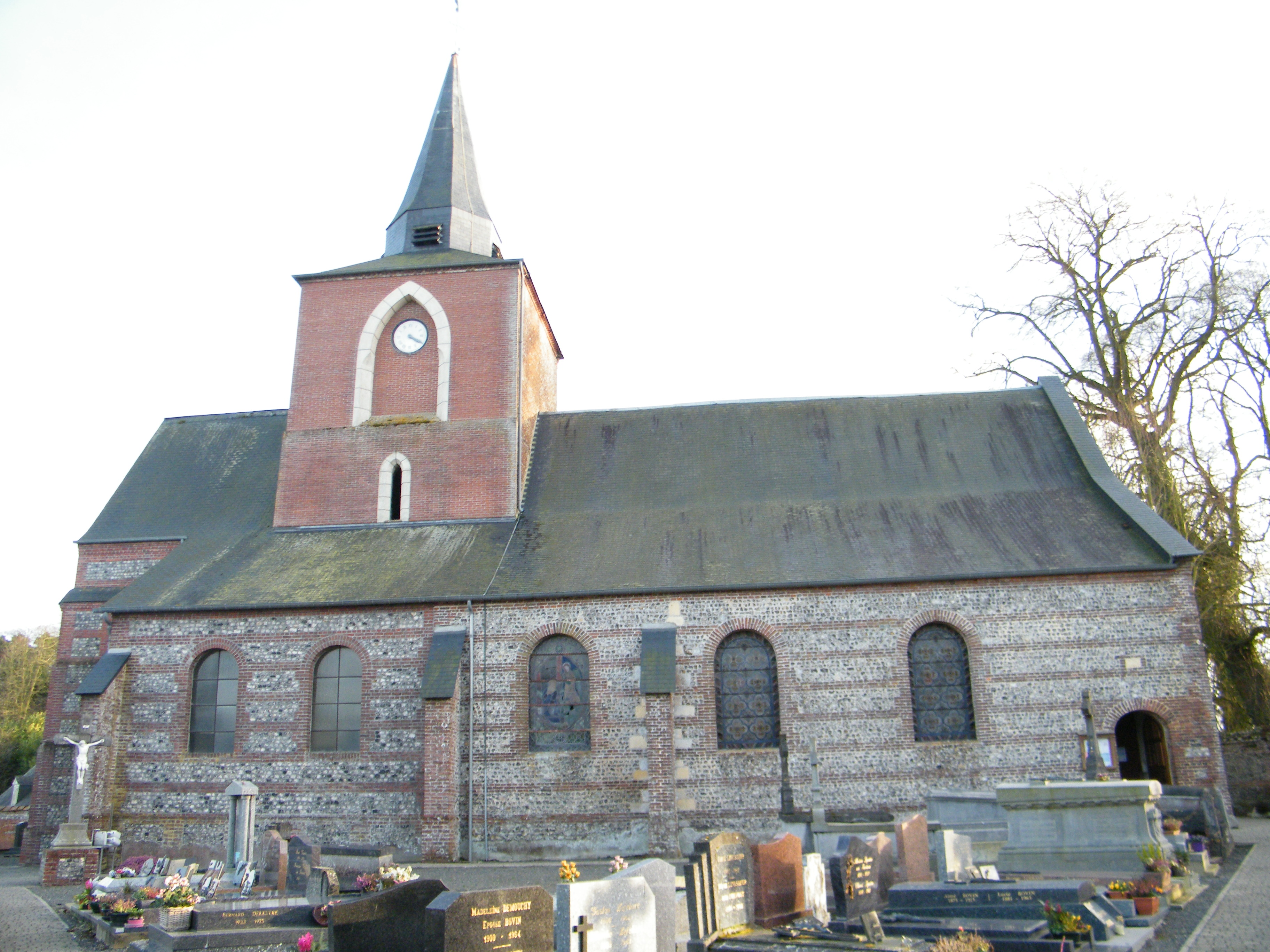 L'église.